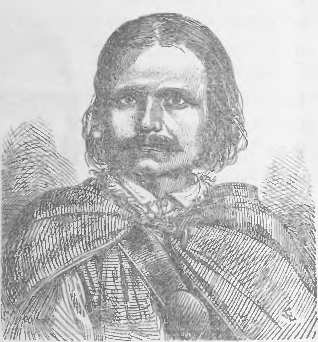 Ilustracja do „Illustrowanego przewodnika do Tatr, Pienin i Szczawnic” Walerego Eljasza-Radzikowskiego. Oryginalny opis:„Maciej Sieczka, przewodnik po Tatrach”.